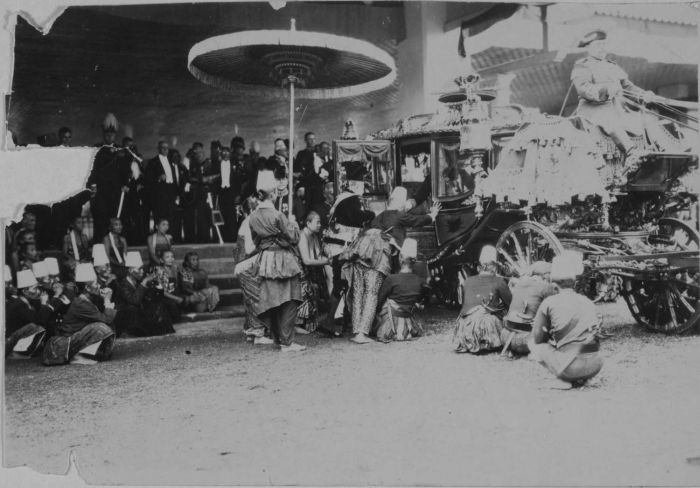 Foto. De Susuhunan van Solo, Pakoe Boewono X, stapt onder toeziend oog van Nederlandse ambtenaren in zijn staatsiekoets op de dag van zijn veertigjarig regeringsjubileum